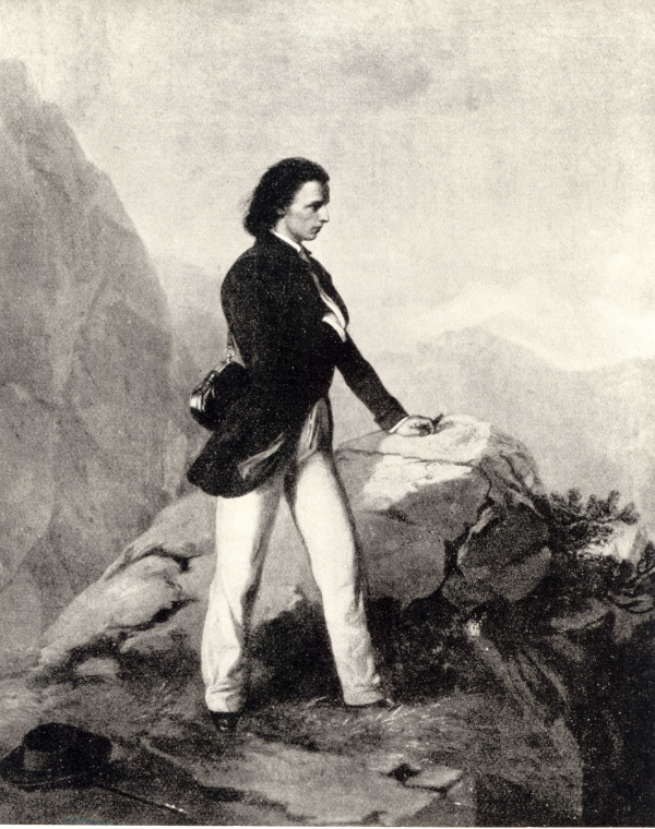 Franciszek Tepa - Autoportret (1852) Wysokość: 43.50 cm Szerokość: 35.50 cm Sygnatura: Tepa p. Olej na płótnie